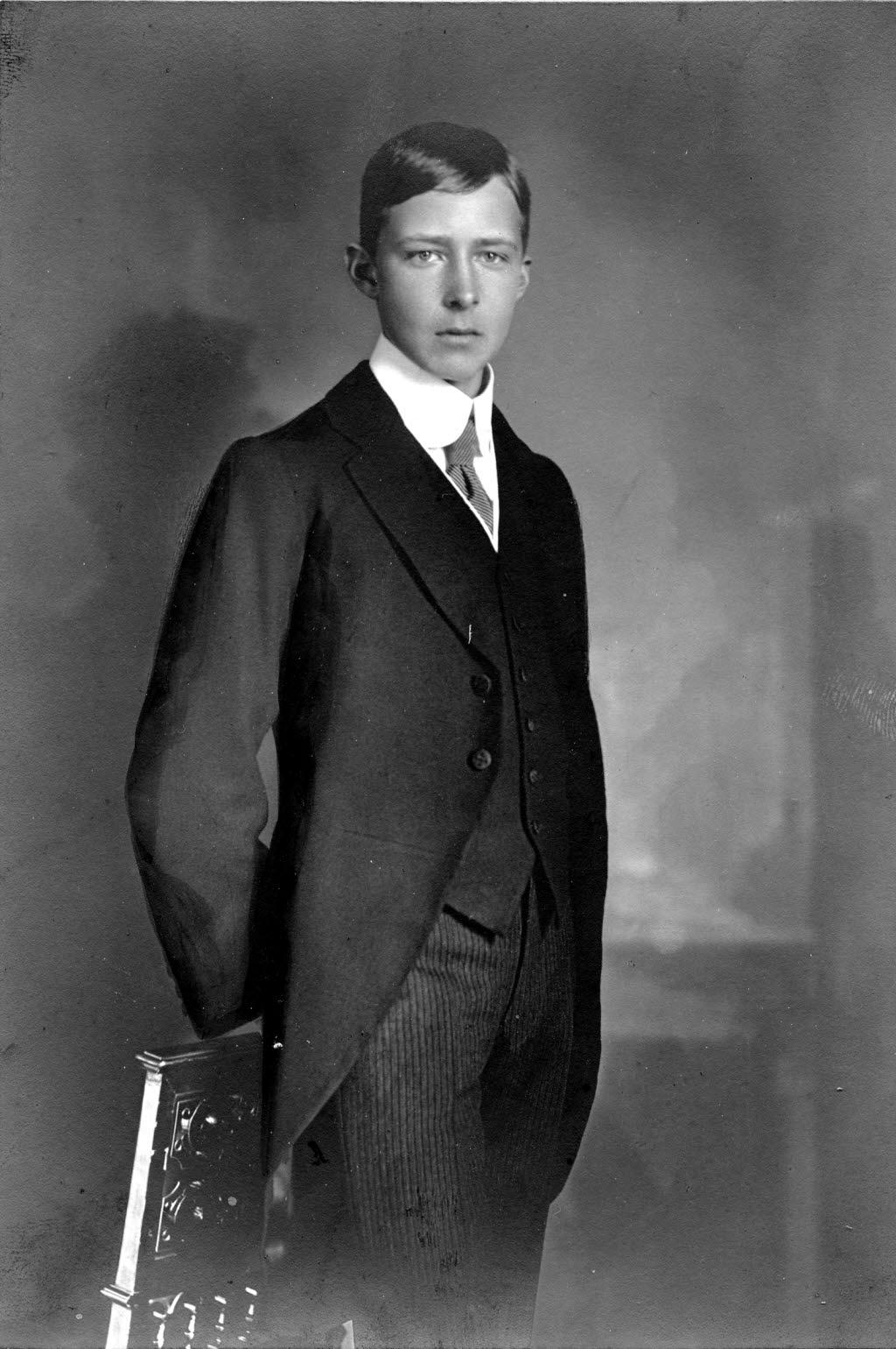 anlässlich seiner Konfirmation im Schloss zu Kiel.